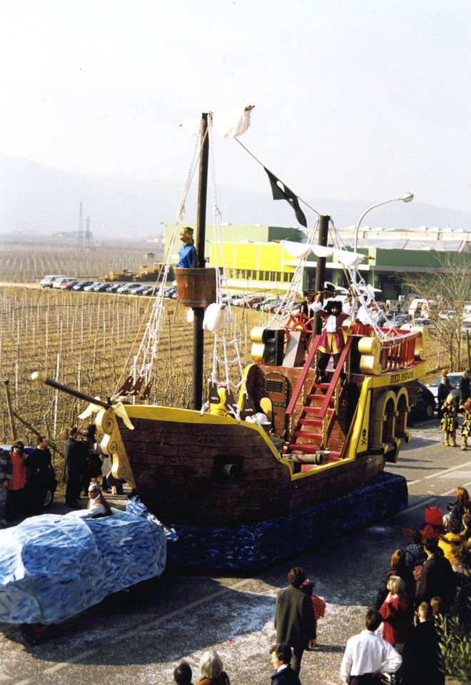 Carro del Coro Monti Pallidi vincitore dell'edizione 2000 del Carnevale di Laives